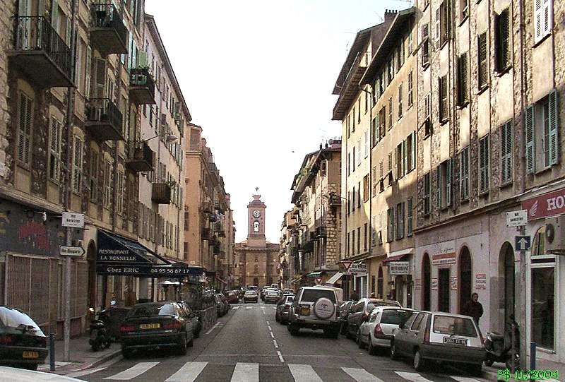 La rue Bavastro de nos jours (prise du début)